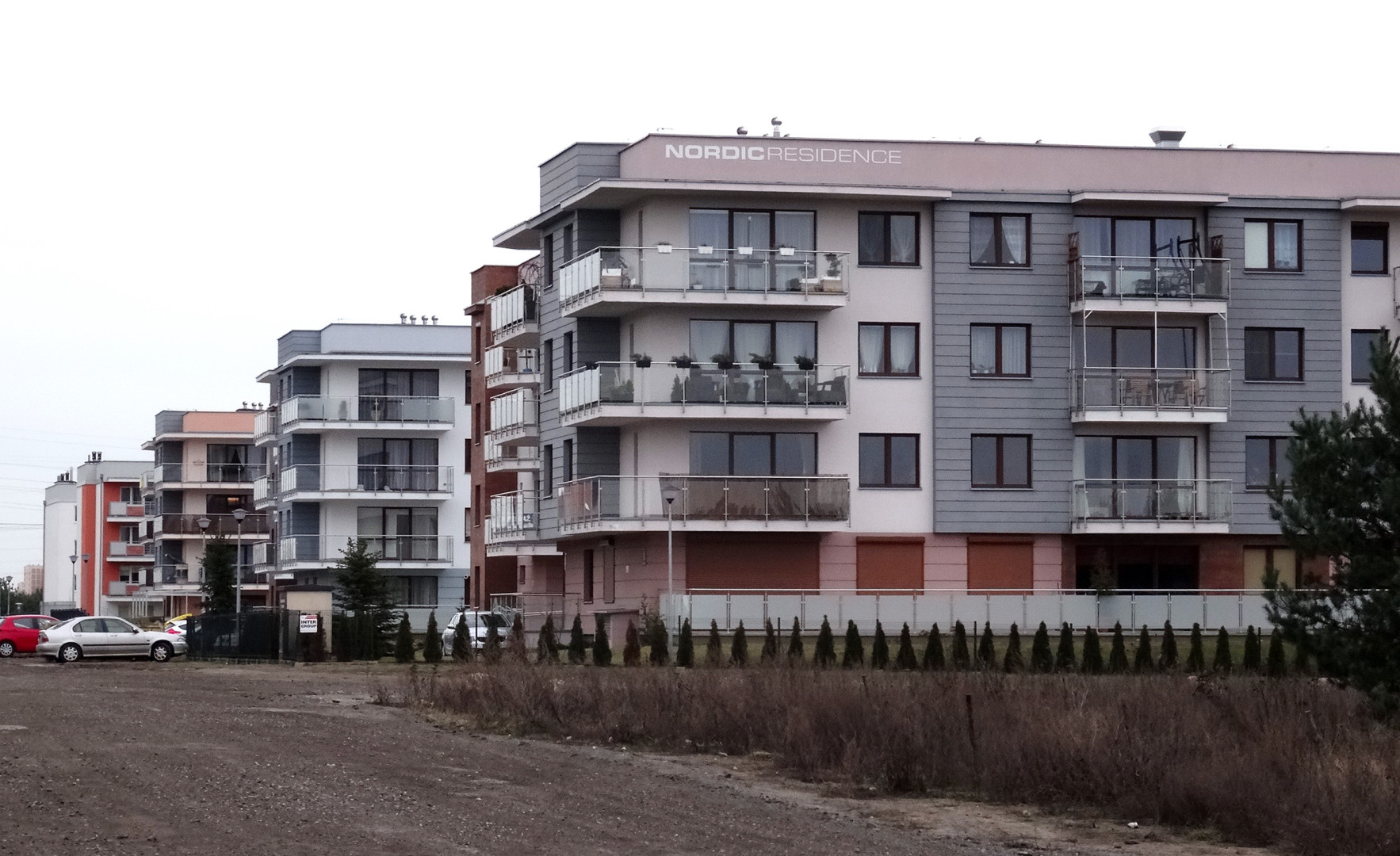 Osiedle Eskulapa w Bydgoszczy (dzielnica Fordon)